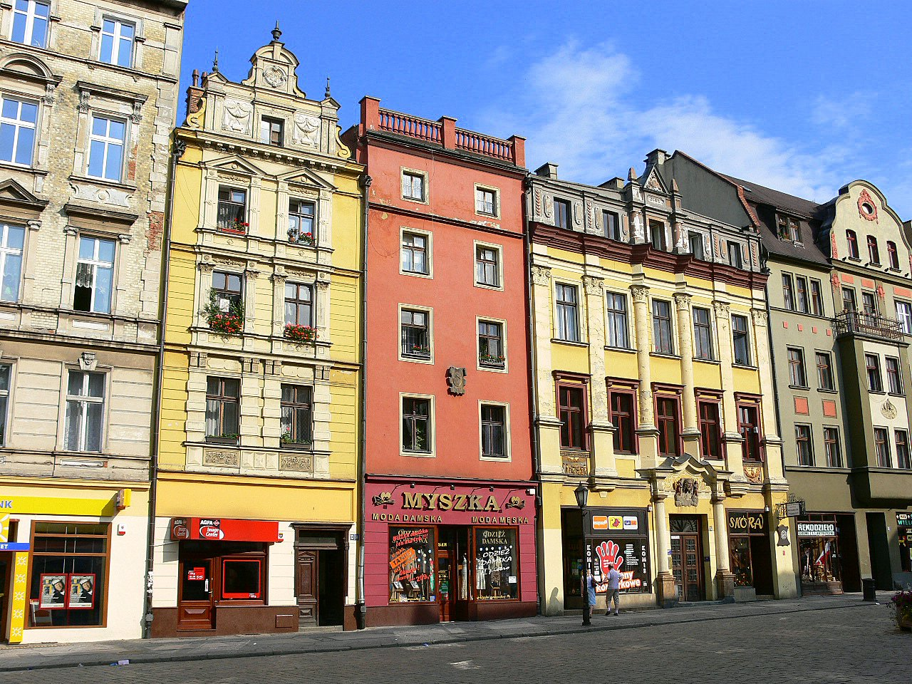 Świdnica - kamienice w rynku.